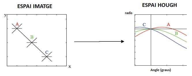 espais